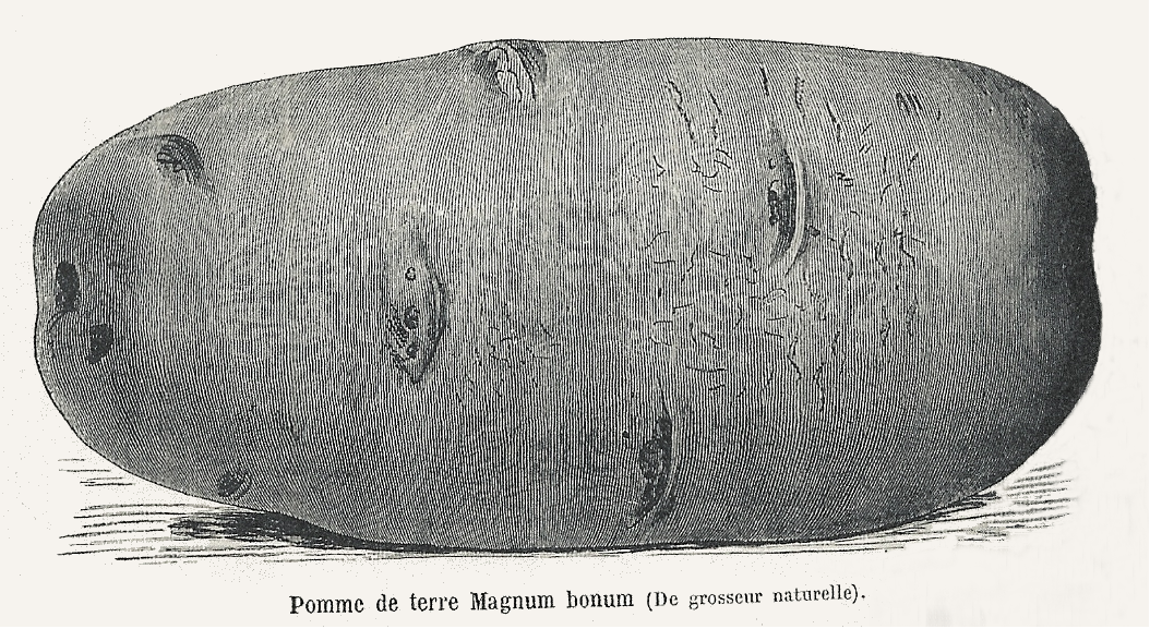 Pomme de terre 'Magnum Bonum'